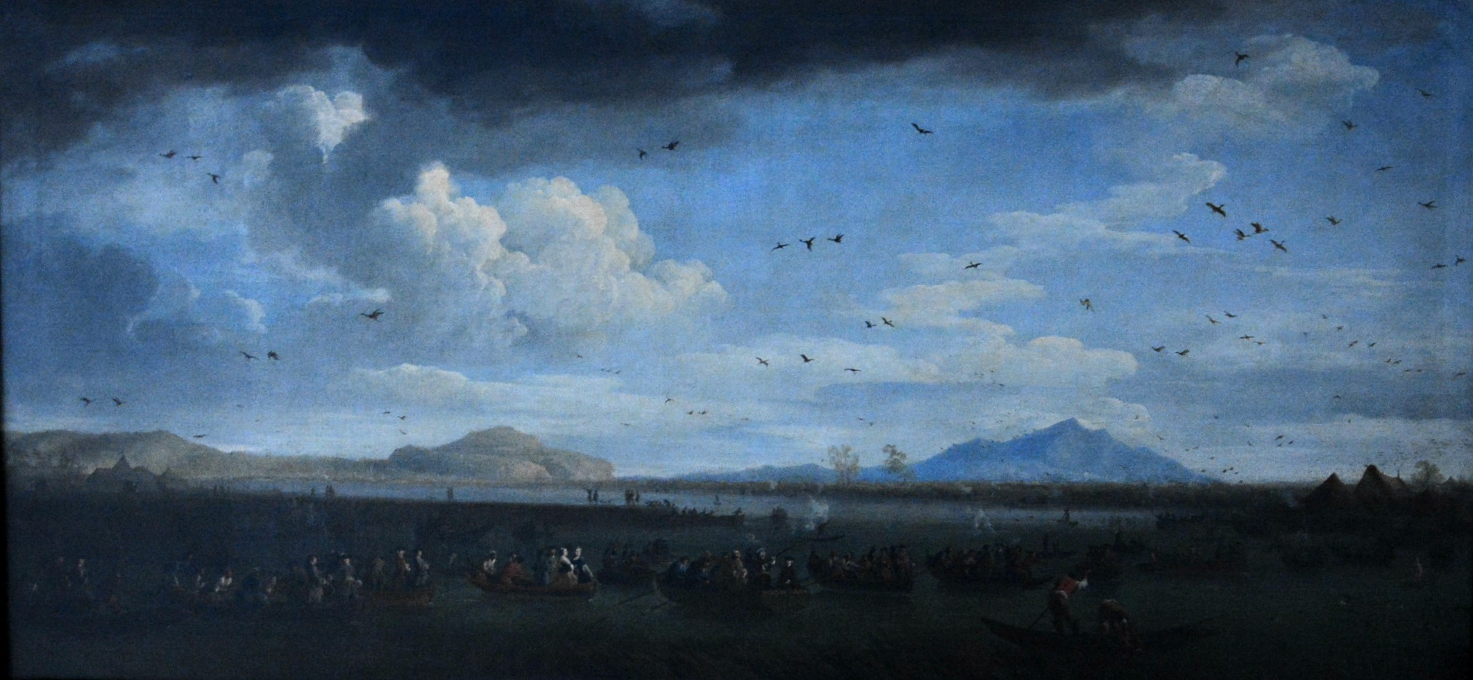 Vedi titolo